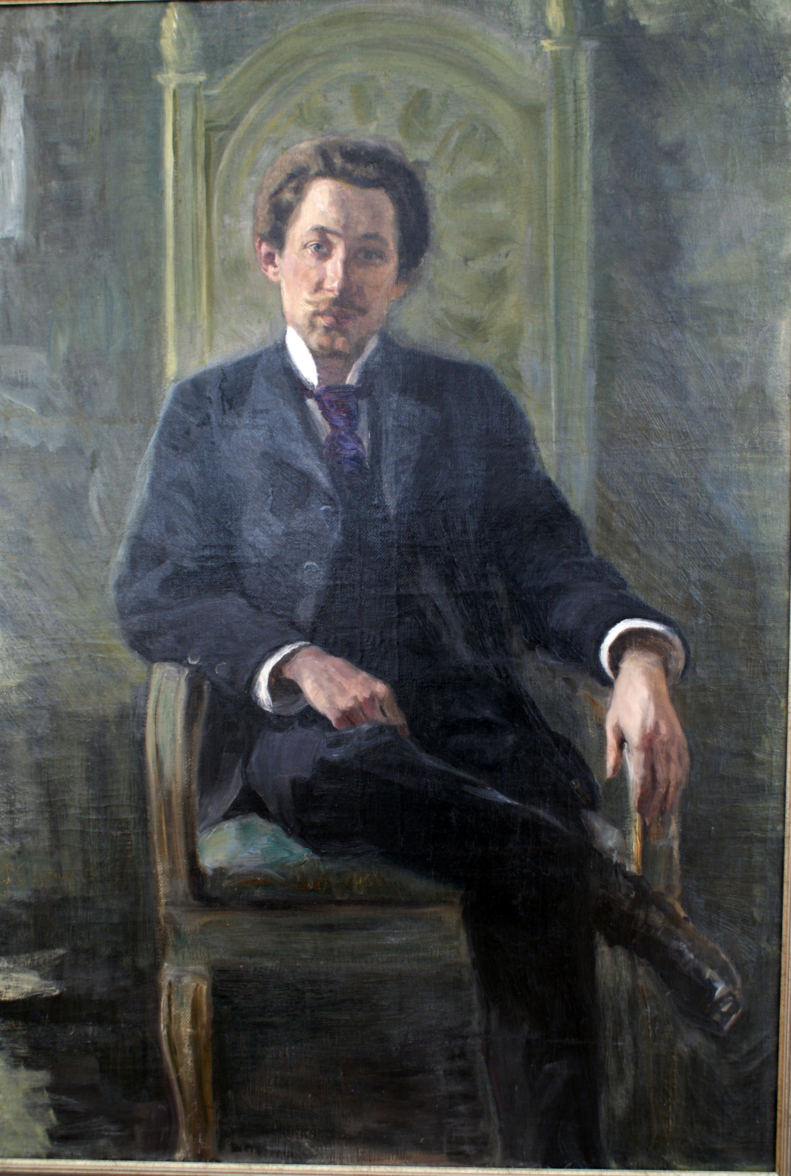 Portrait of Nikolai Bonch-Osmolovsky ?